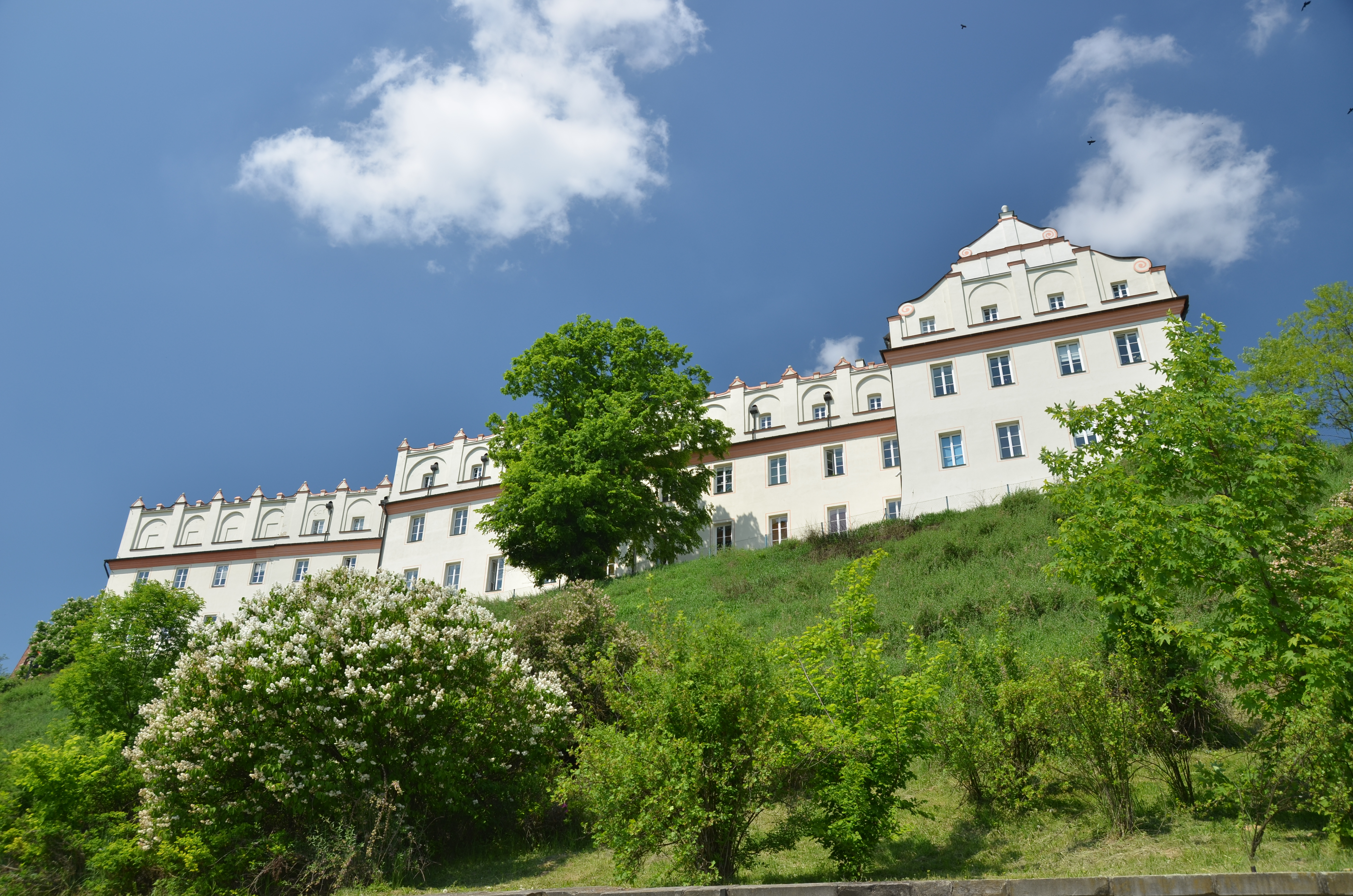 Sandomierz, kolegium jezuickie „Collegium Gostomianum”, lata 1605-1615, XIX w.